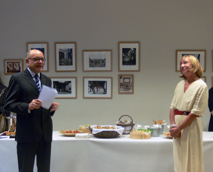 Remise de la Légion d'honneur à Martine Poulain, par Jean Guéguinou, ambassadeur de France. Cérémonie à l'INHA le 9 octobre 2012.